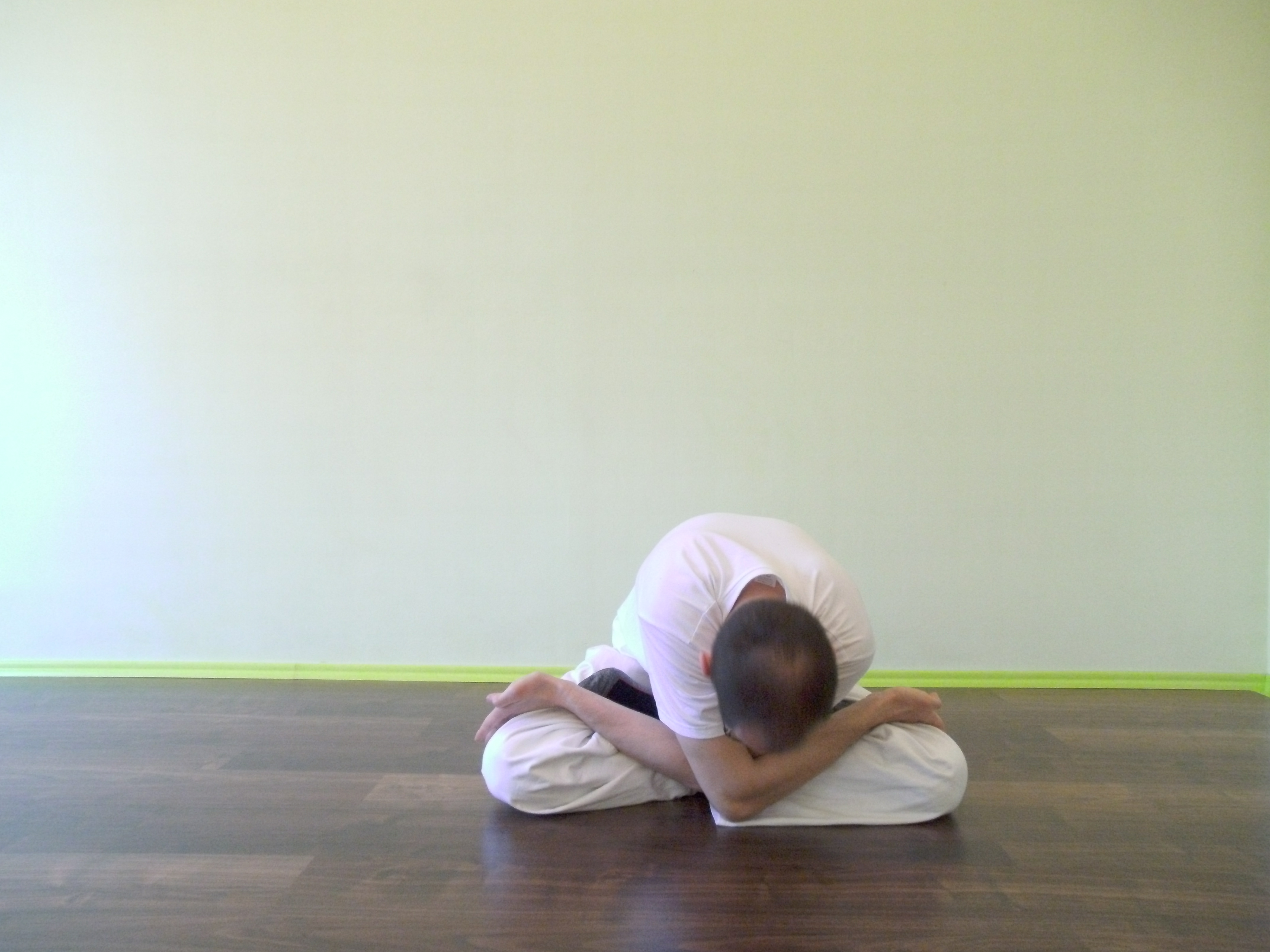 Makko Ho Übung für Perikard- und Dreifacher Erwärmer Meridian